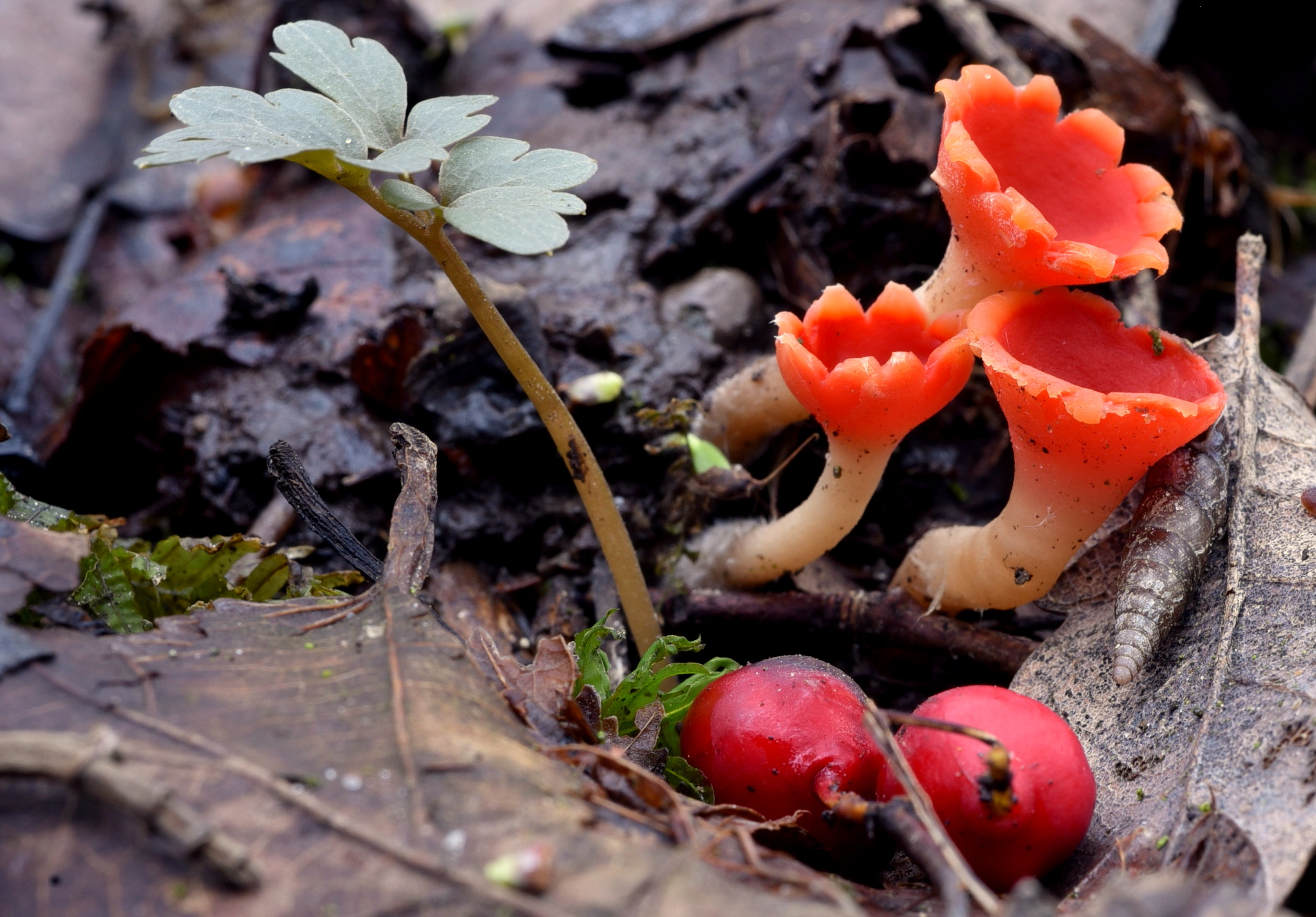 Starsze owocniki Microstoma protractum z dobrze widocznymi trzonami